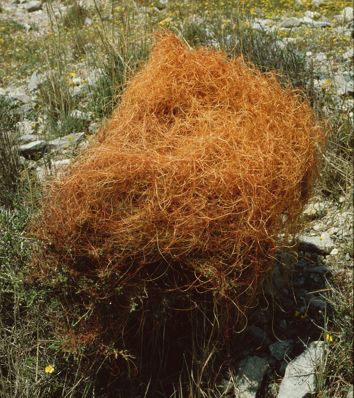 Cuscuta sp., Windengewächse (Convolvulaceae), auf Anthyllis hermanniae – Griechenland/Ελλάδα/Greece: Erisos/Έρισος, Assos/Άσσος, Festungsberg (Kefallinia/Κεφαλληνία)